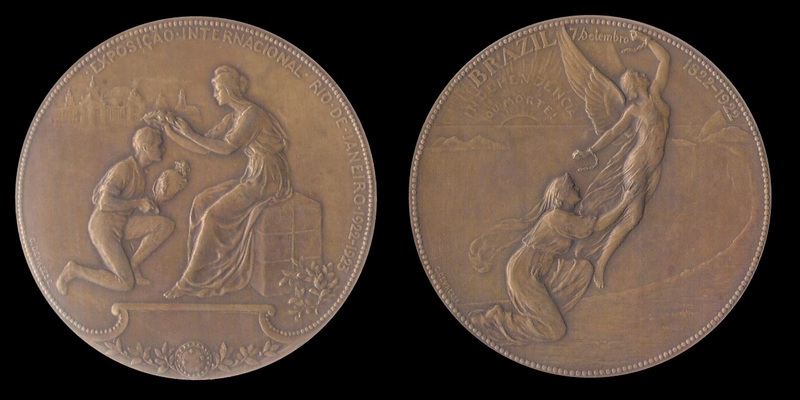 Medalha da Exposição Internacional do Centenário da Independência (1922-1923), cunhada na Bélgica pela J. Fonson & Cia. Gravador: Godefroid Devreese